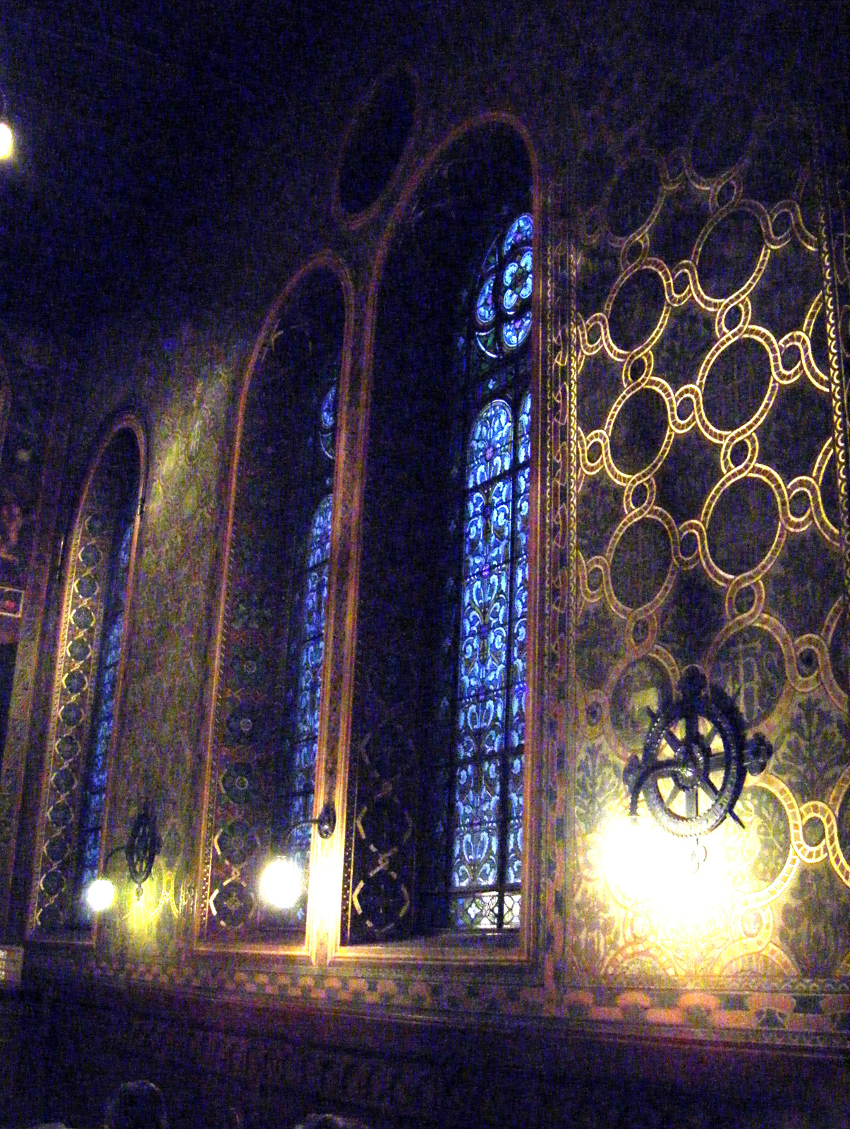 Pázmáneumi kapelle